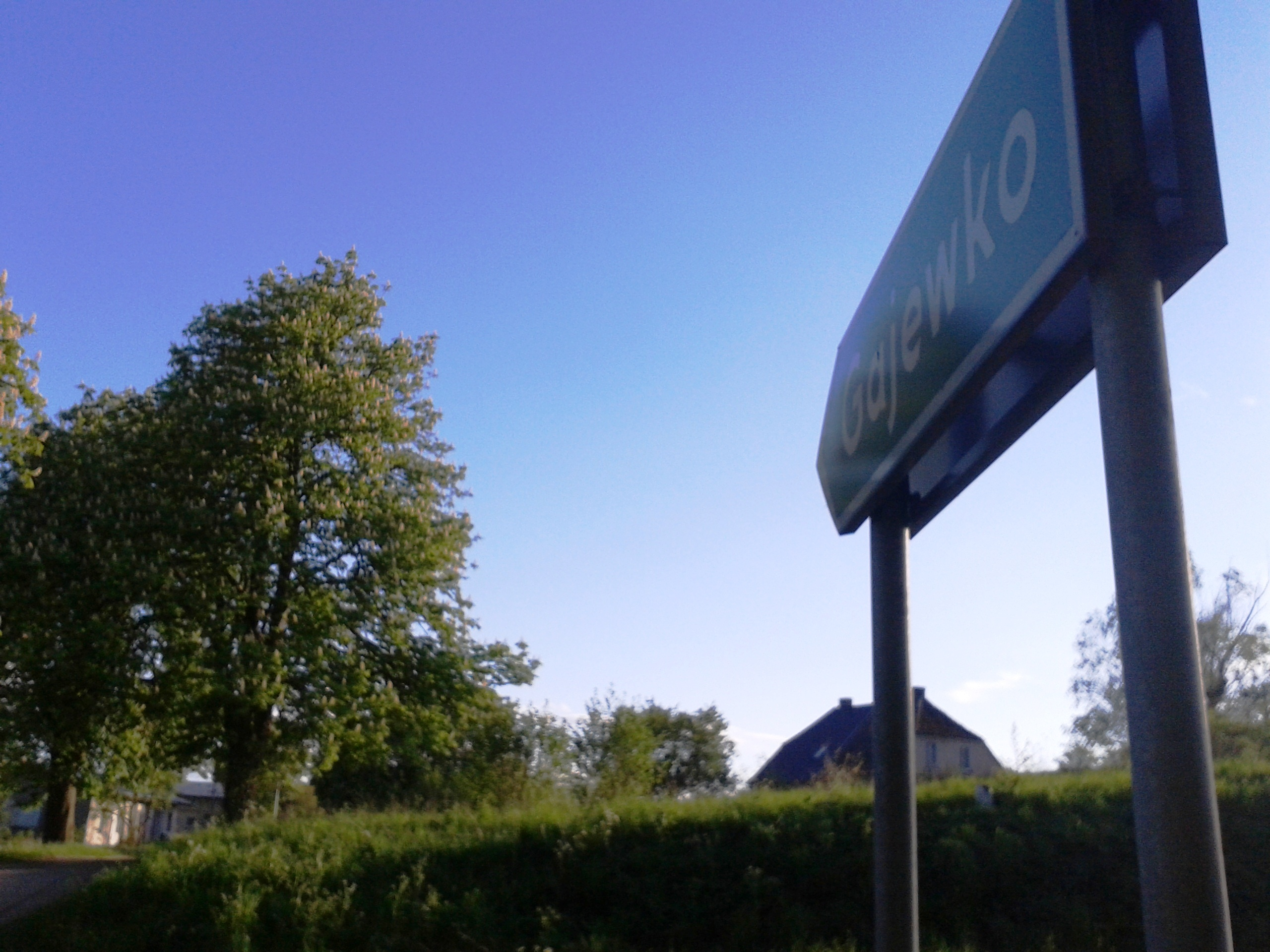 Gajewko gmina Drawsko Pomorskie